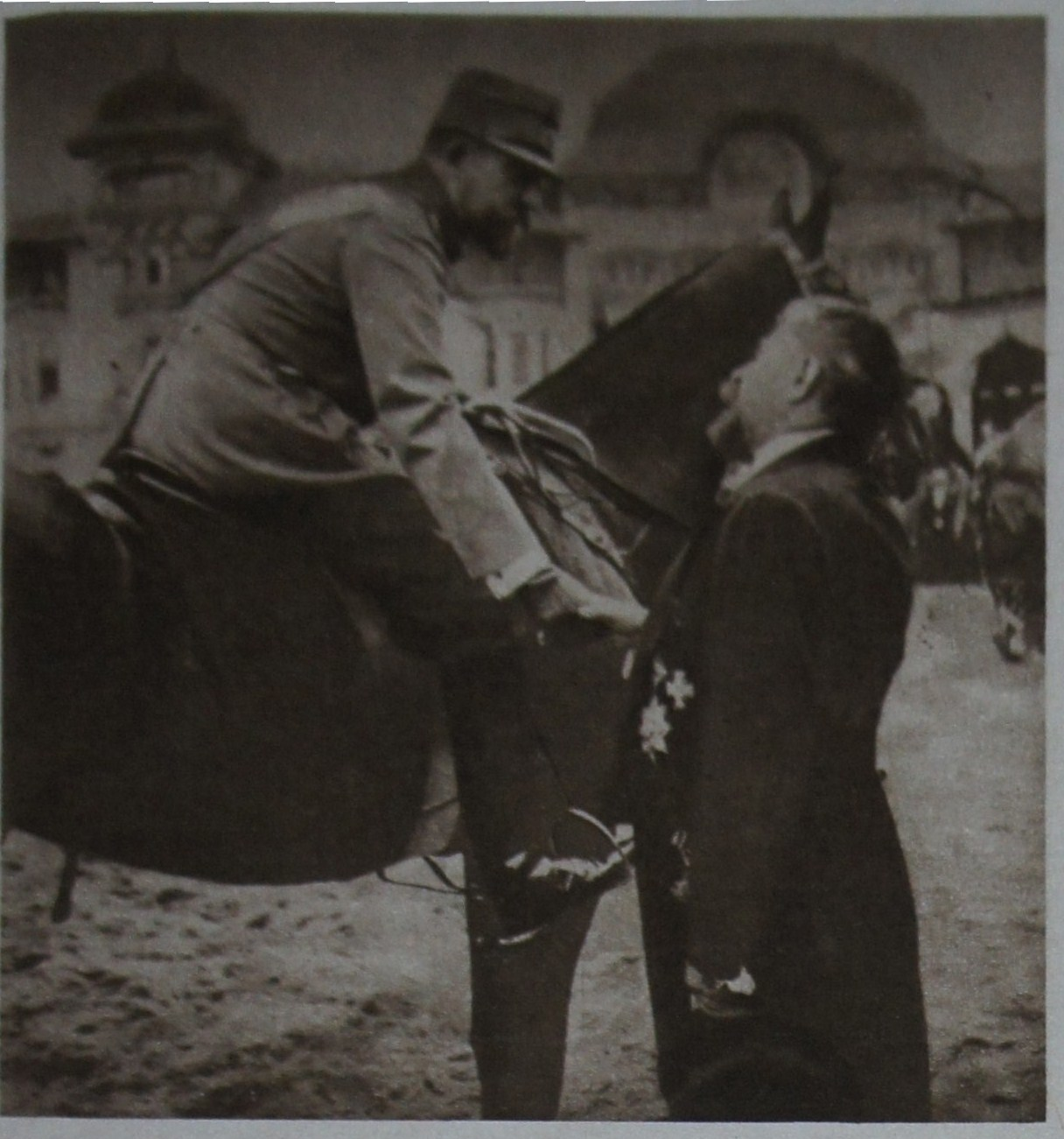 publié dans le journal "le miroir".